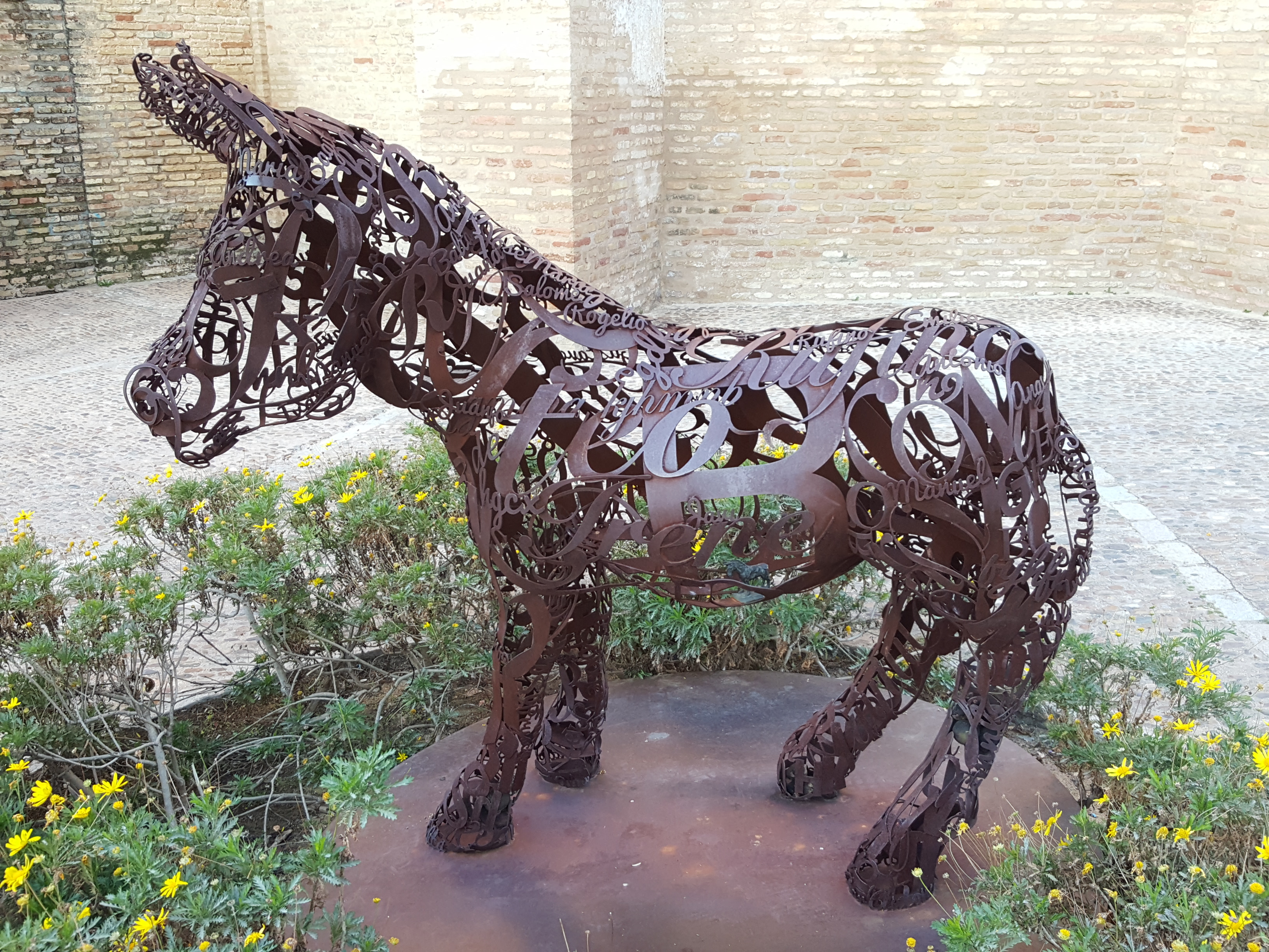 Escultura Perteneciente al Museo, al aire libre Moguer EScultura de Moguer, Andalucía (España). Escultura Incluida en la serie PlateroEScultura con el nombre "Asnografía".